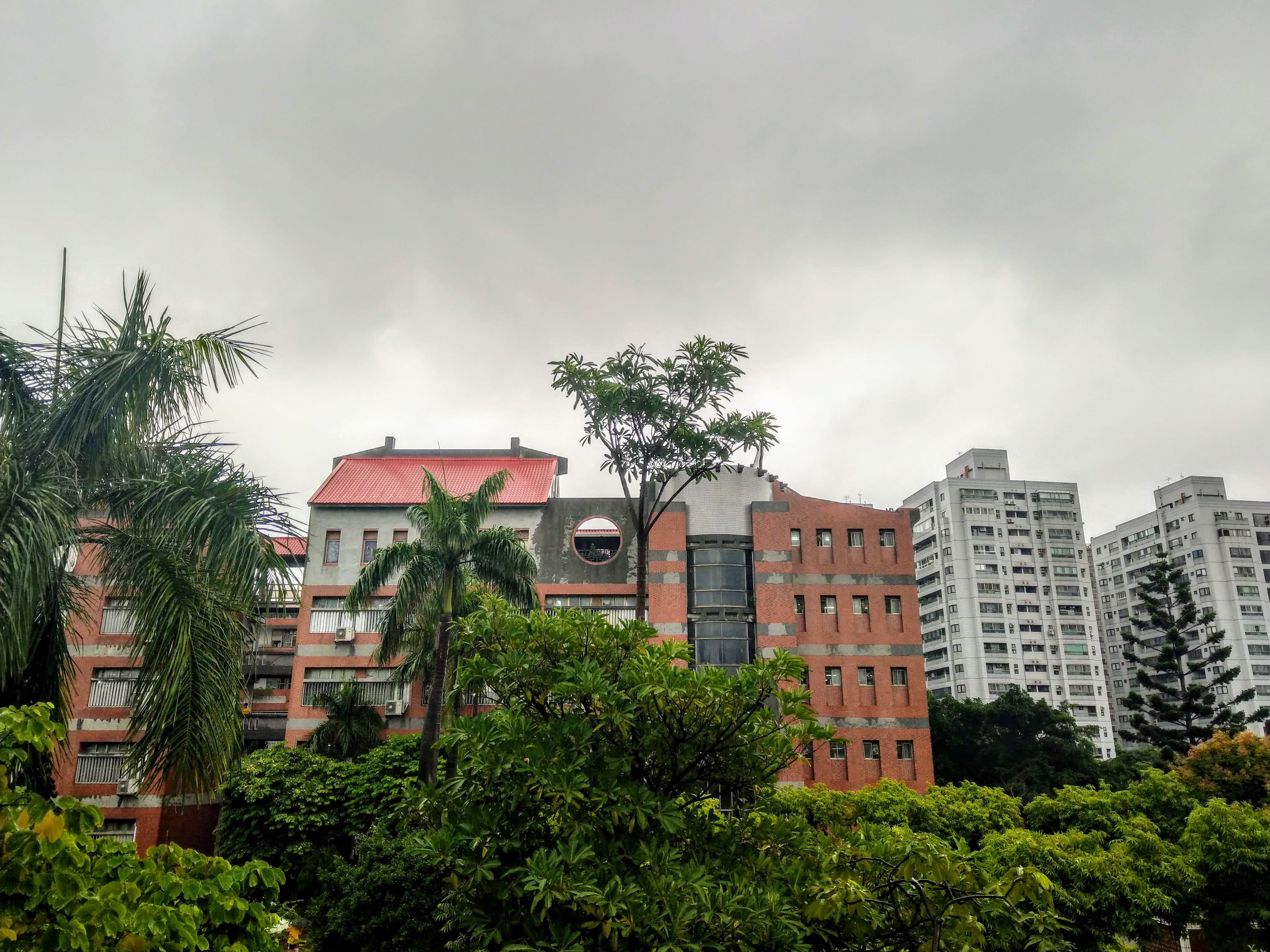 這張照片顯示從武陵高中志清樓望向崇德樓的景色。